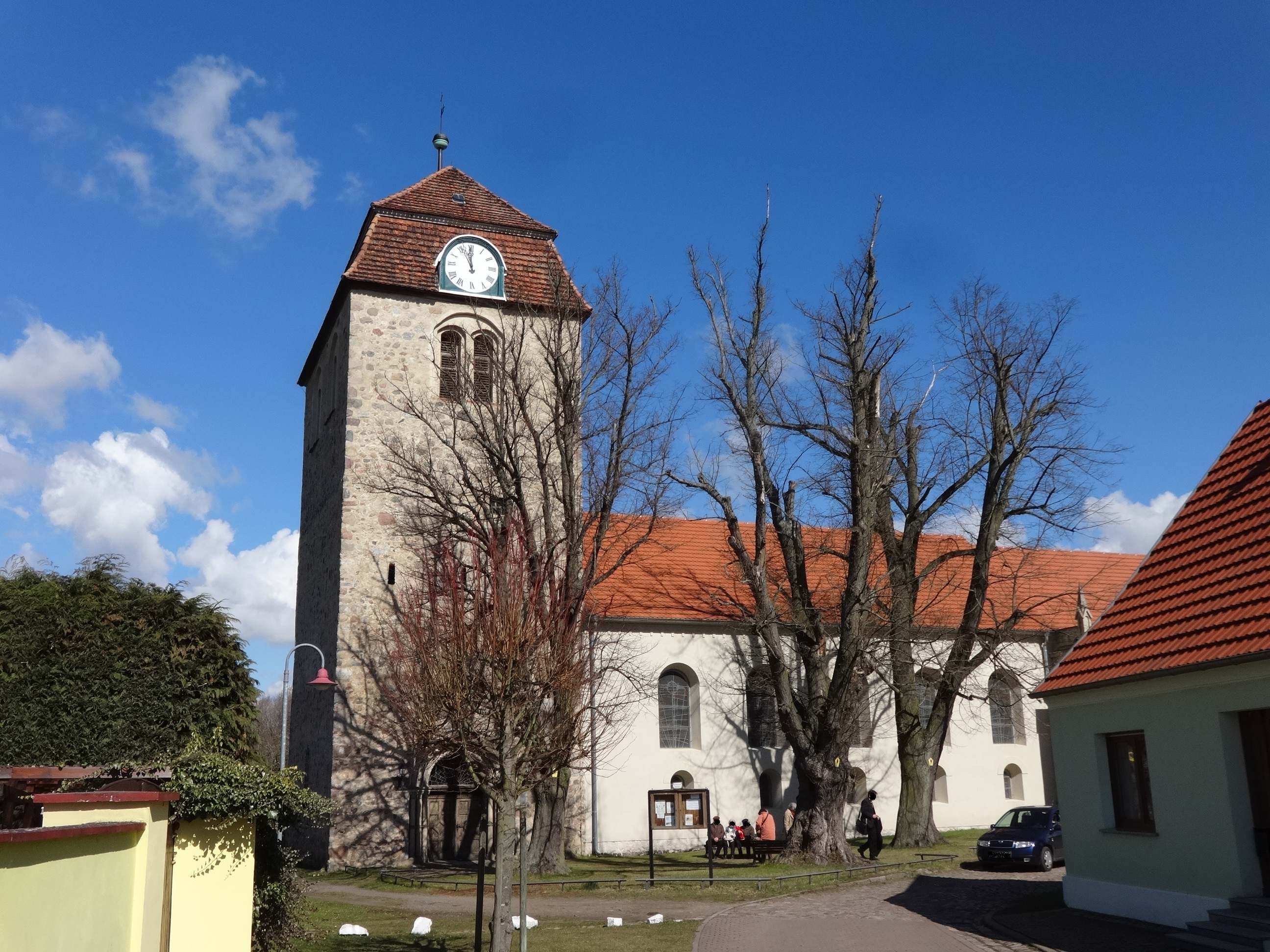 Die Dorfkirche Görzke entstand um 1200 als romanischer Feldsteinbau mit langgestrecktem Chor und Apsis. Über die Entstehungsgeschichte ist bislang nicht viel bekannt. 1882 erfolgten erhebliche Umbauarbeiten. Aus dieser Zeit stammen sowohl die Kanzel wie auch das Gestühl. Ein Taufengel stammt aus dem Anfang des 18. Jahrhunderts. Weiterhin befinden sich der Kirche mehrere Epitaphe derer von Schierstedt.